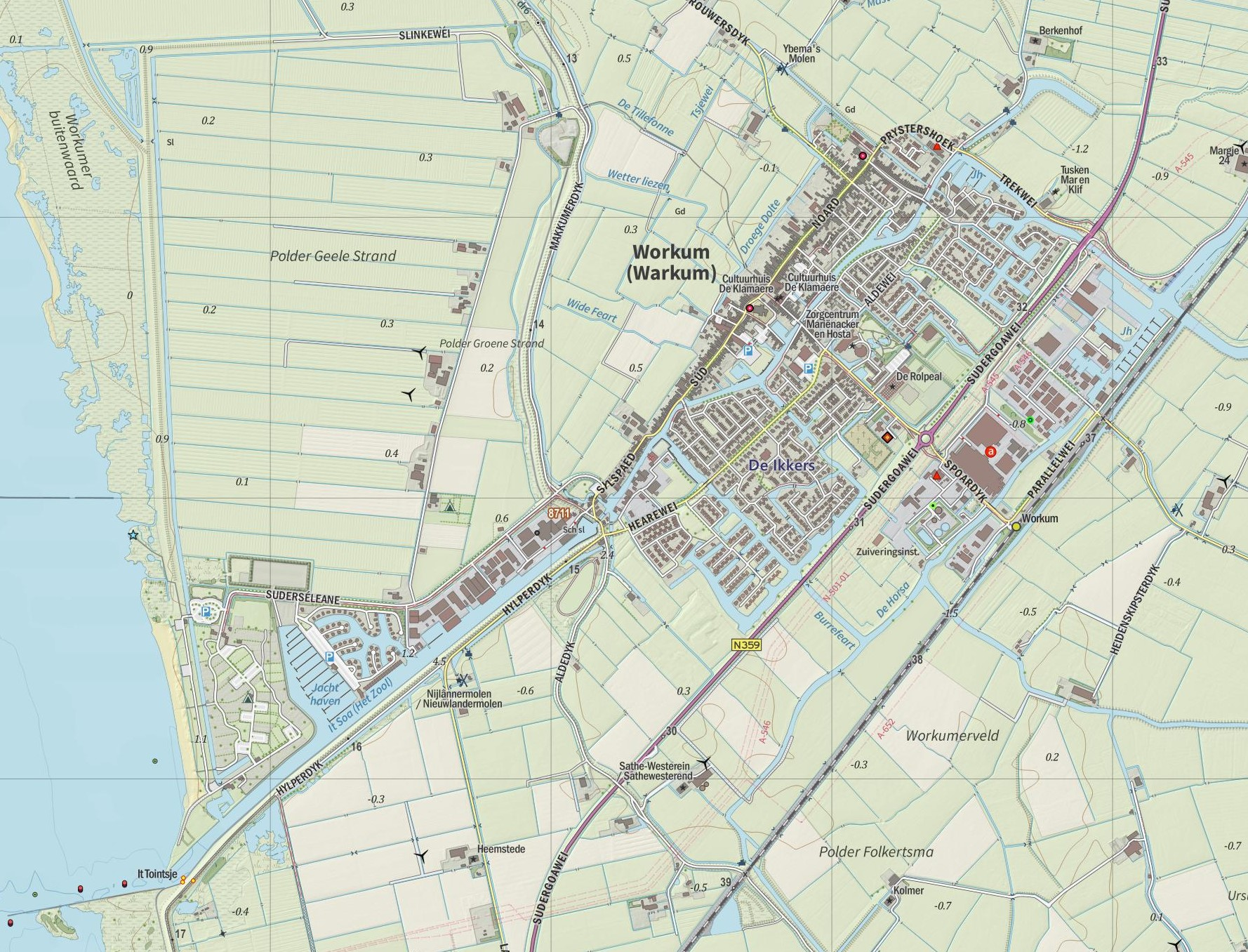 Kaart van Workum